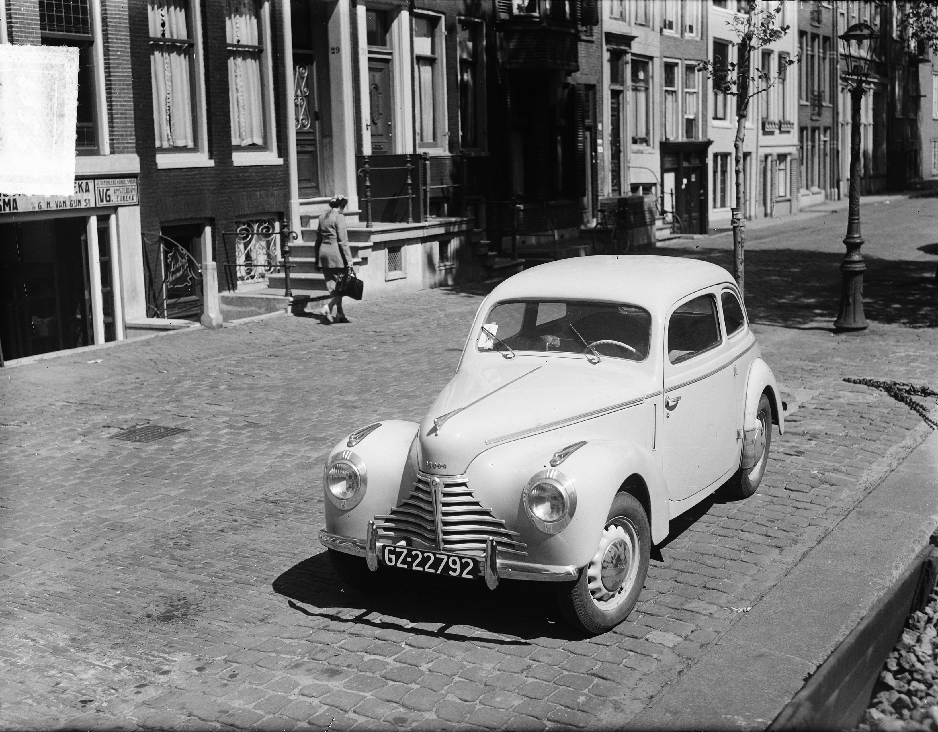 Collectie / Archief : Fotocollectie Anefo Reportage / Serie : [ onbekend ] Beschrijving : Skoda-automobiel Annotatie : Škoda 1101 Tudor. De auto heeft het kenteken GZ-22792 Datum : 2 mei 1949 Trefwoorden : auto's Fotograaf : Fotograaf Onbekend / Anefo Auteursrechthebbende : Nationaal Archief Materiaalsoort : Glasnegatief Nummer archiefinventaris : bekijk toegang 2.24.01.09 Bestanddeelnummer : 903-3555